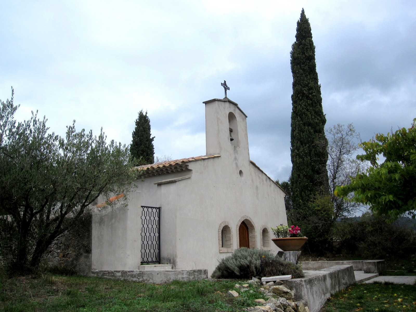 Chapelle du village de Riboux - Var - France